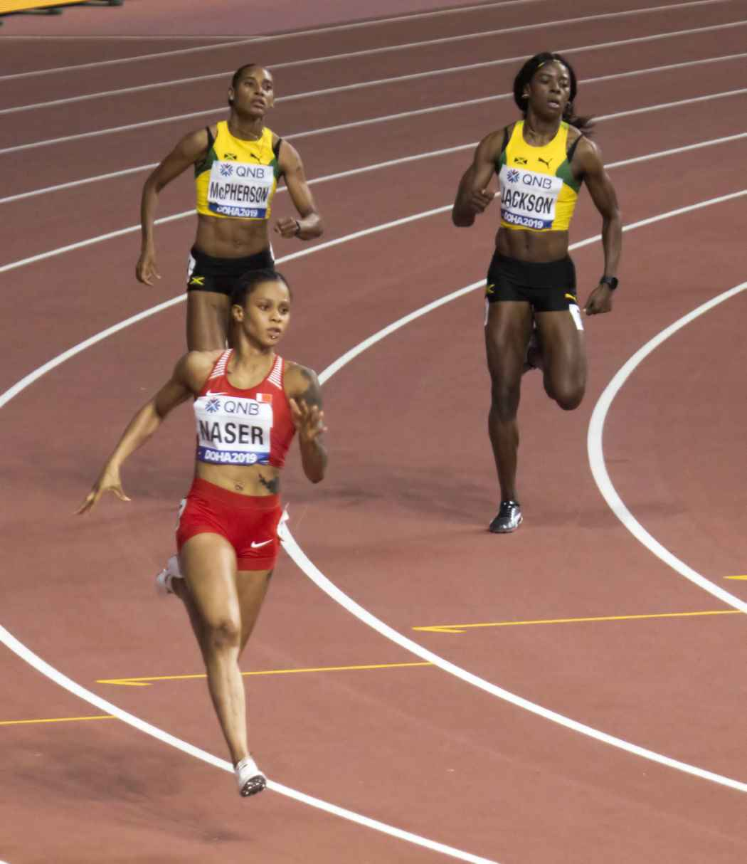 DOH70113 400m women final naser